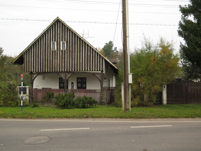 Usedlost čp. 86, Jíkev 86, Jíkev.